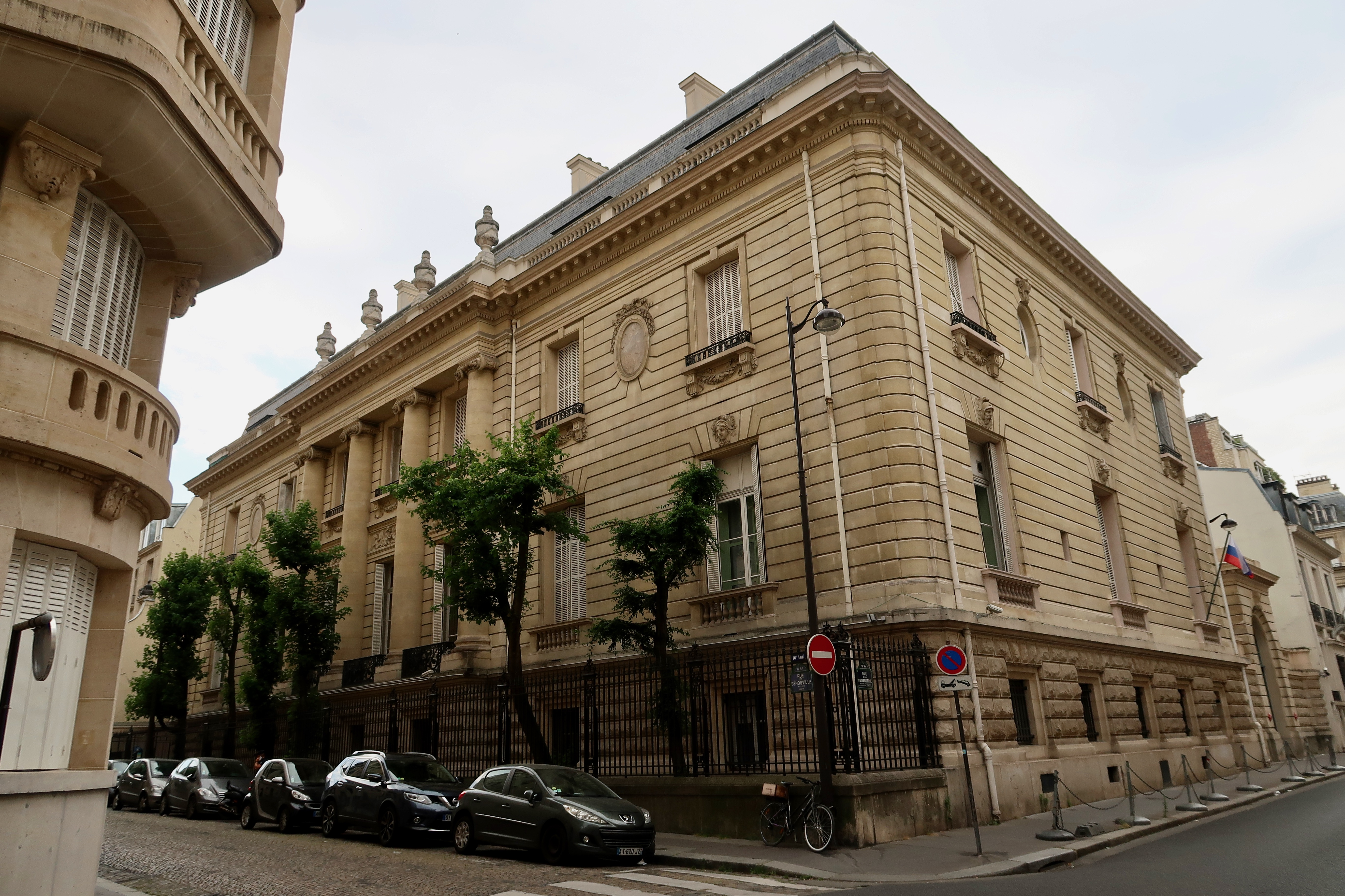 Croisement de la rue de la Faisanderie et de la rue Bénouville, hôtel Hériot (Paris, 16e).